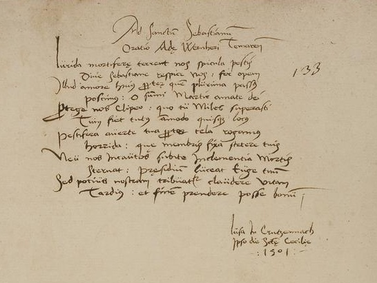 Eigenhändiges Gedicht bzw. Gebet an St. Sebastian, von Johann Adam von Themar